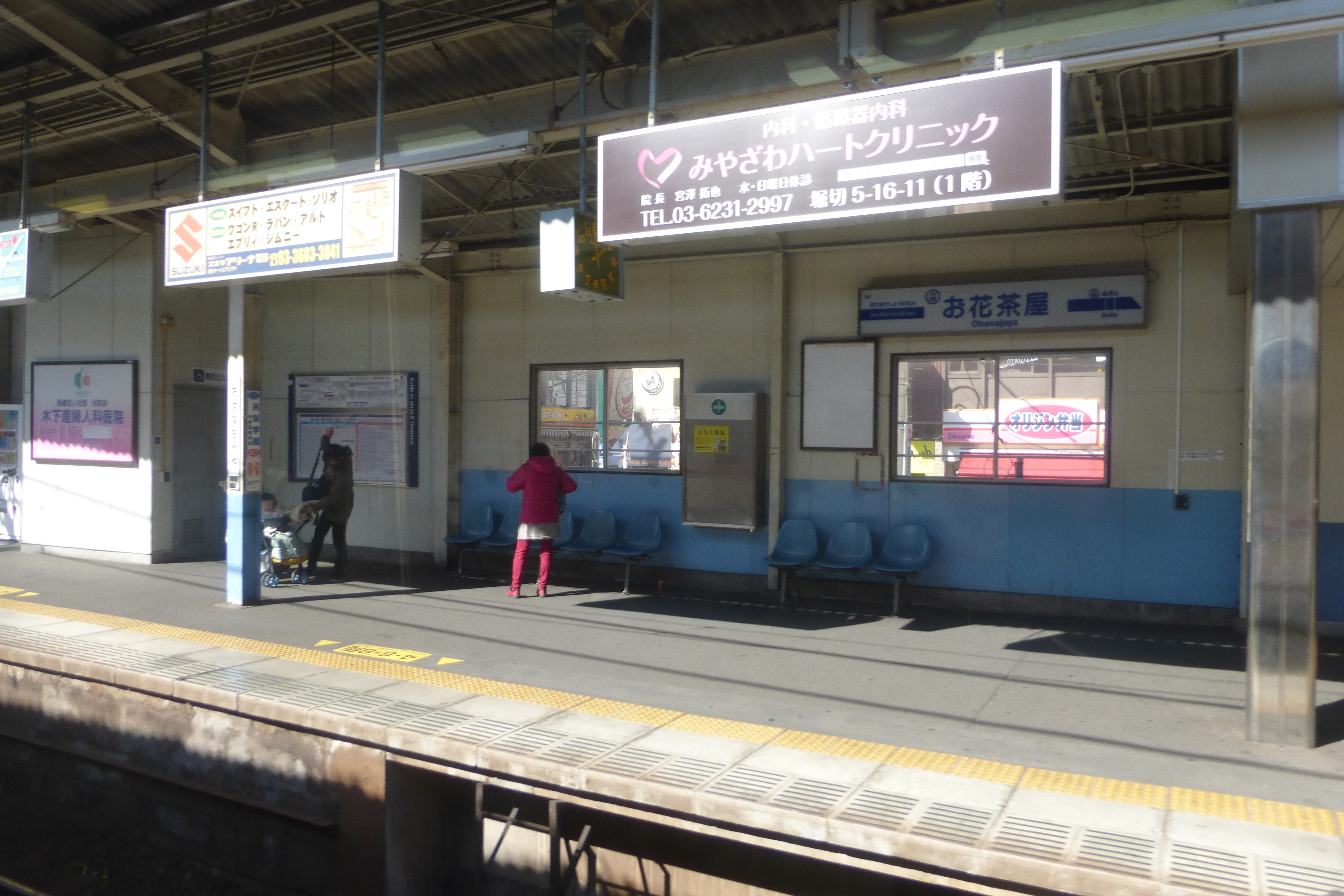 Ohanajaya Station (お花茶屋駅)